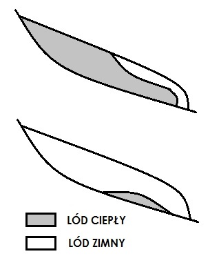 Rycina ukazuje przykładowy rozkład temperatury lodu w lodowcu politermalnym, na podstawie Bennett M.R., Glasser N.F., 2009, Glacial geology. Ice Sheets and Landforms, Wiley-Blackwell, s.30.